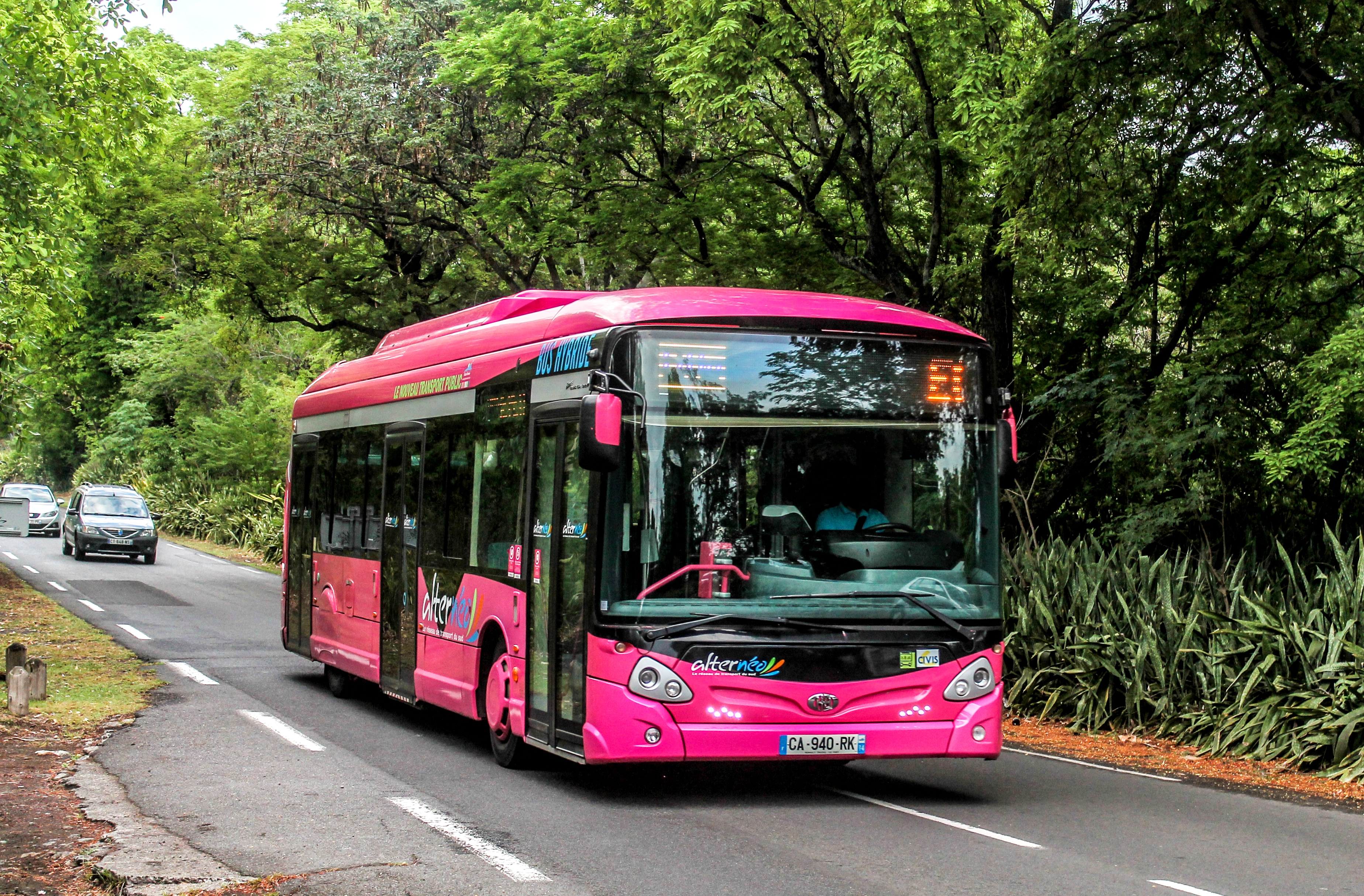 photo of a Heuliez-Bus GX327 Hybride Alternéo